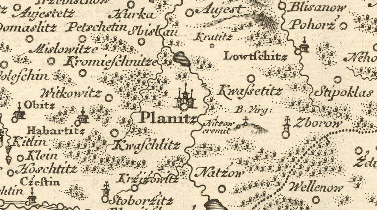 Plánice na Müllerově mapě Čech z roku 1720. Mapová sbírka Historického ústavu AV ČR na CD-ROM, sekce XVII